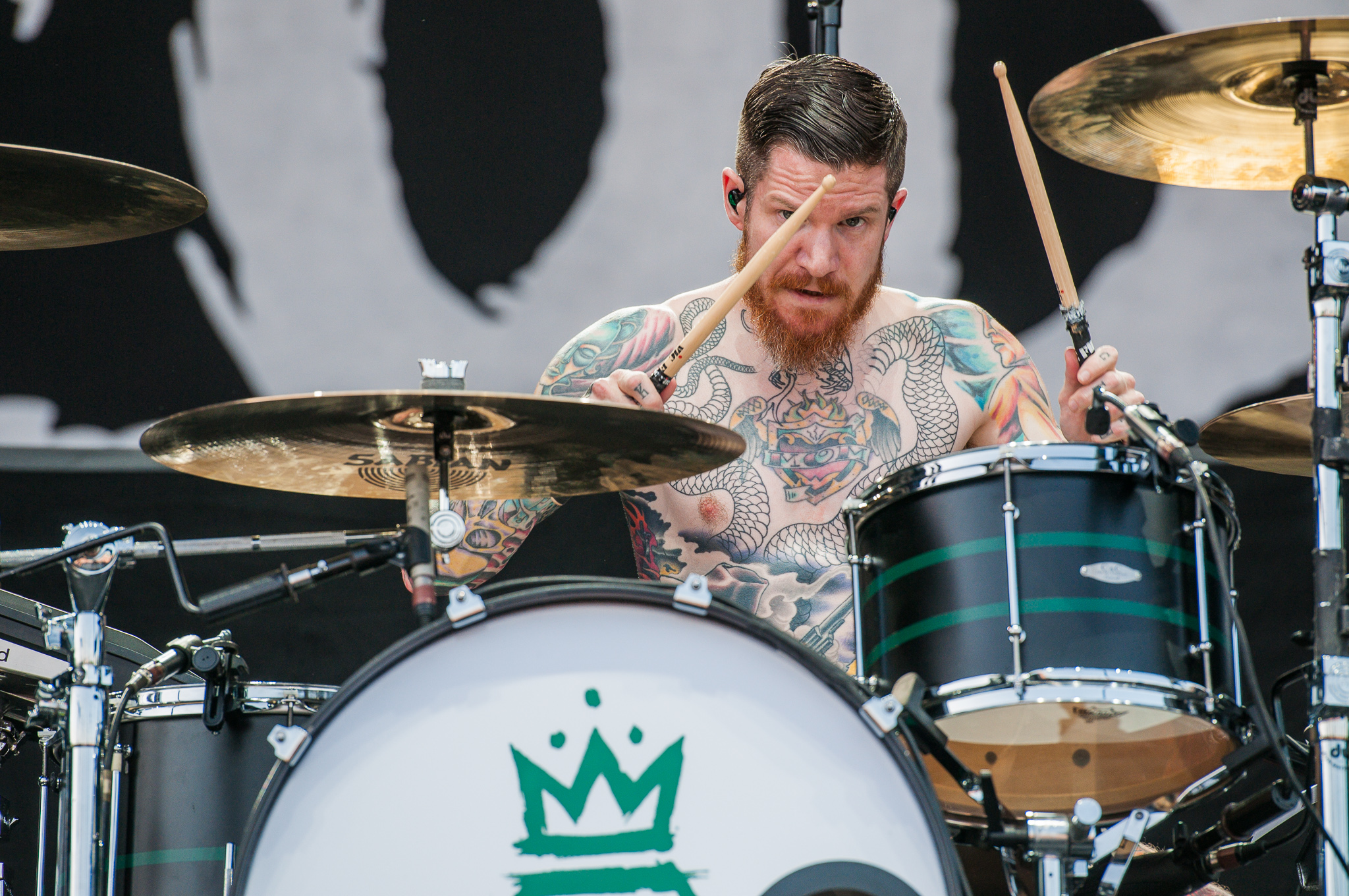 ARGO-Konzerte,Andy Hurley,Centerstage,Fall Out Boy,Konzert,Livekonzert,Livemusik,Musik,RiP,Rock im Park 2014